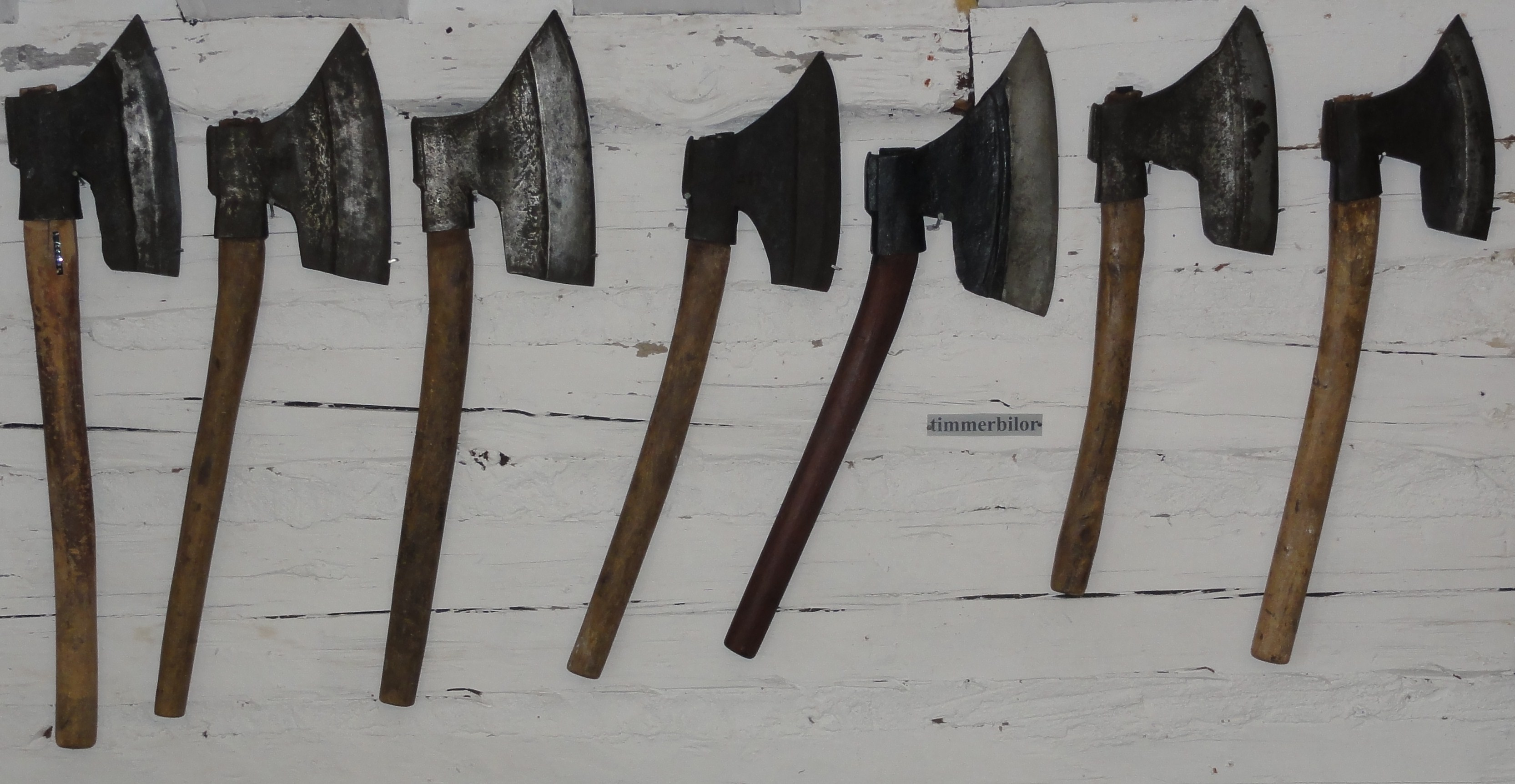 Timmerbilor